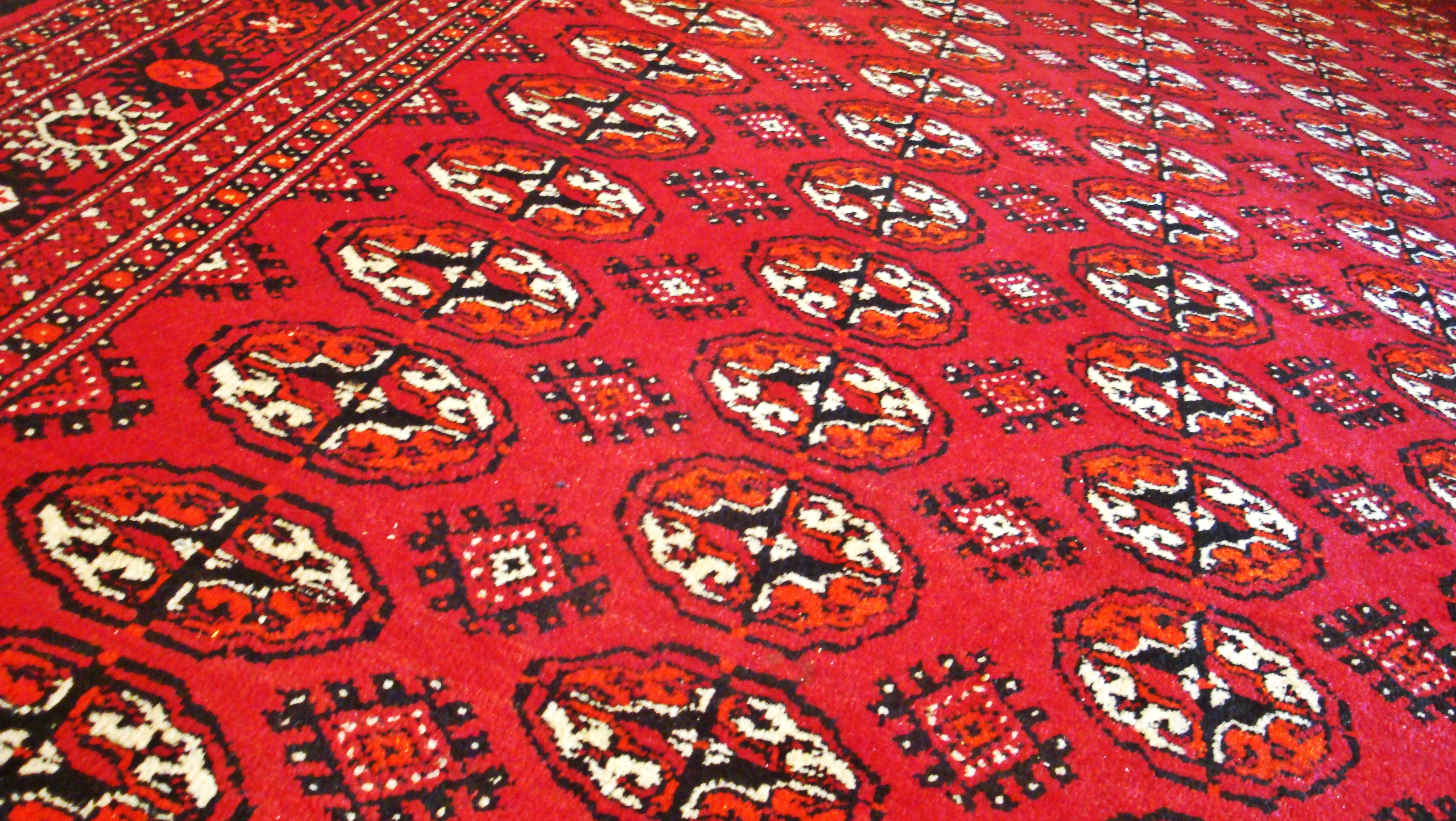 Туркменский ковёр